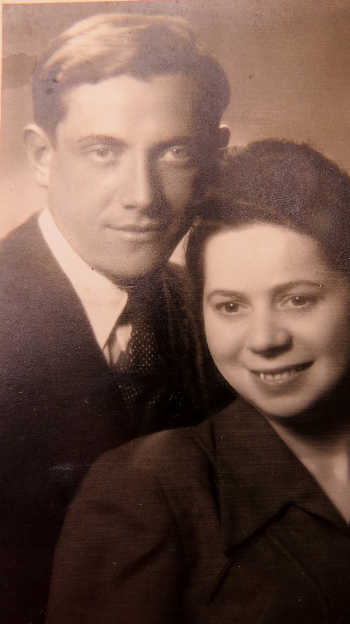 רחל ורצהייזר רובינוביץ' ובעלה לובה, 1947